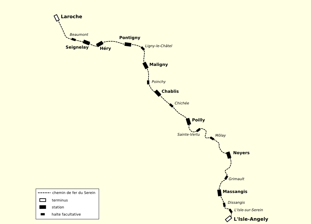 Tracé du chemin de fer du Serein - ligne Laroche - l'Isle-Angely (Yonne)